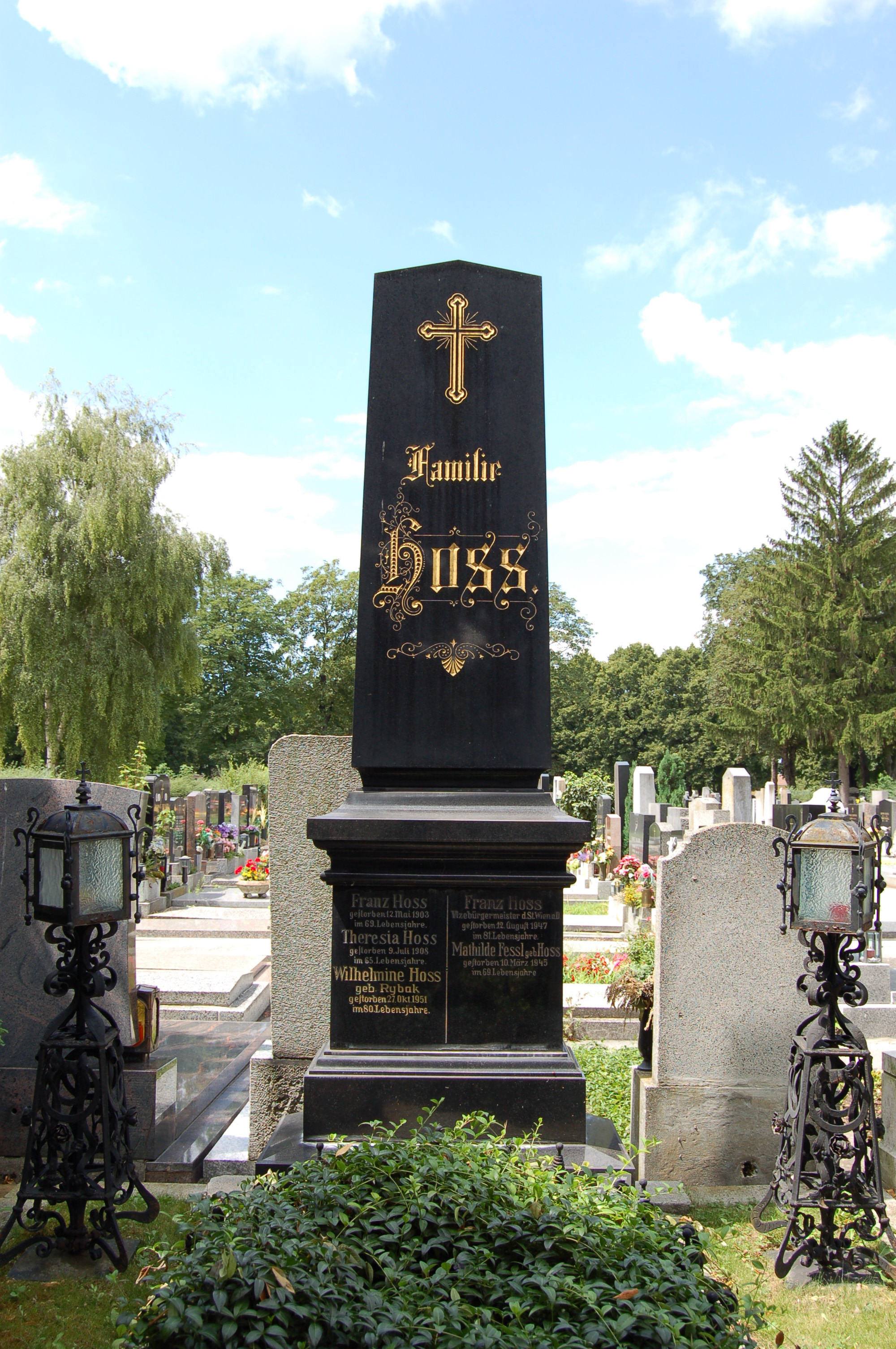 Stammersdorfer Zentralfriedhof, ehrenhalber gewidmetes Grab von Franz Hoß, Grabmal von Ernst Fiala, Vizebürgermeister von Wien